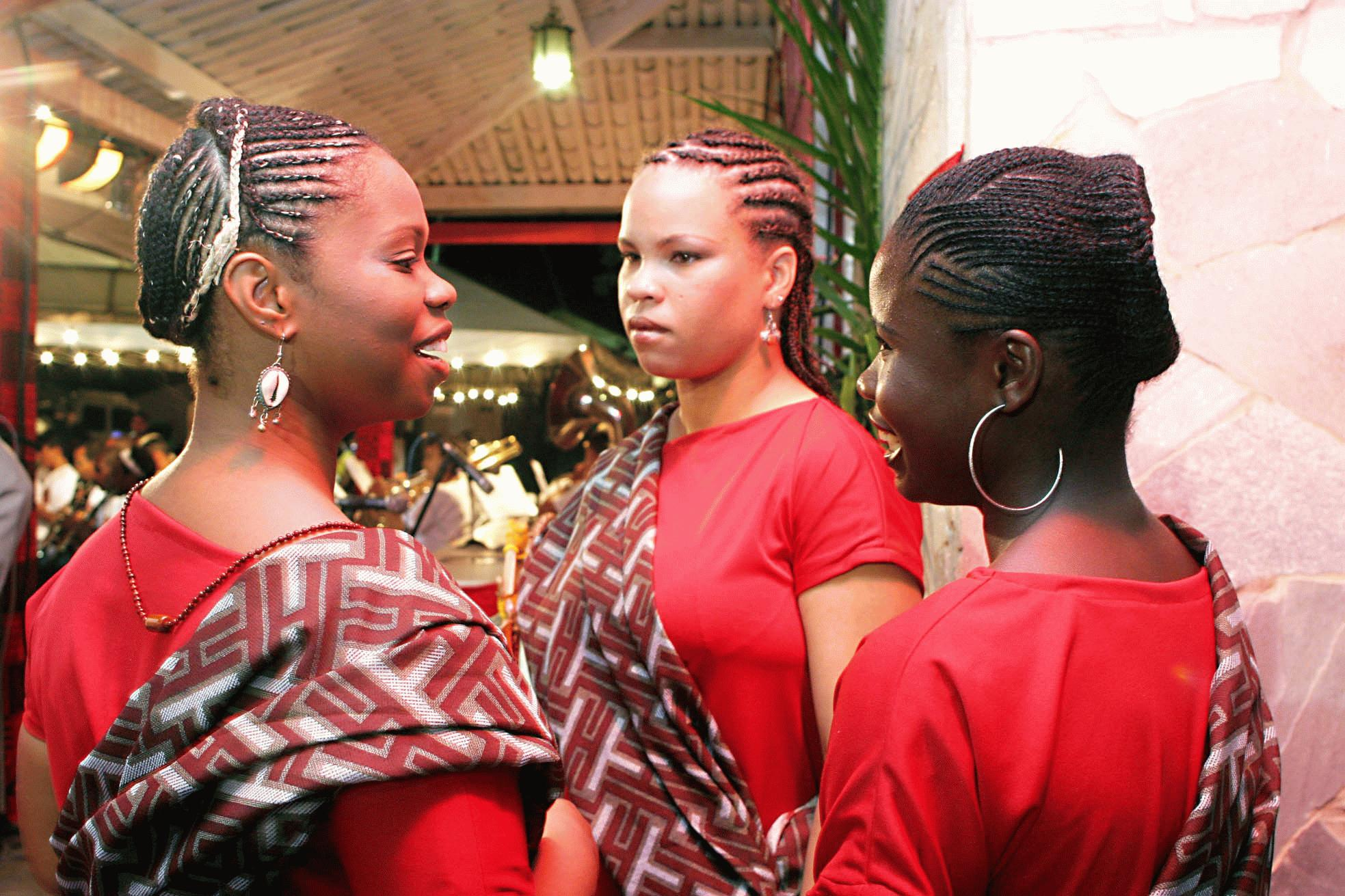 Filhas-de-santo moradoras do Terreiro Ilê Axé Opô Afonjá em Salvador, Bahia